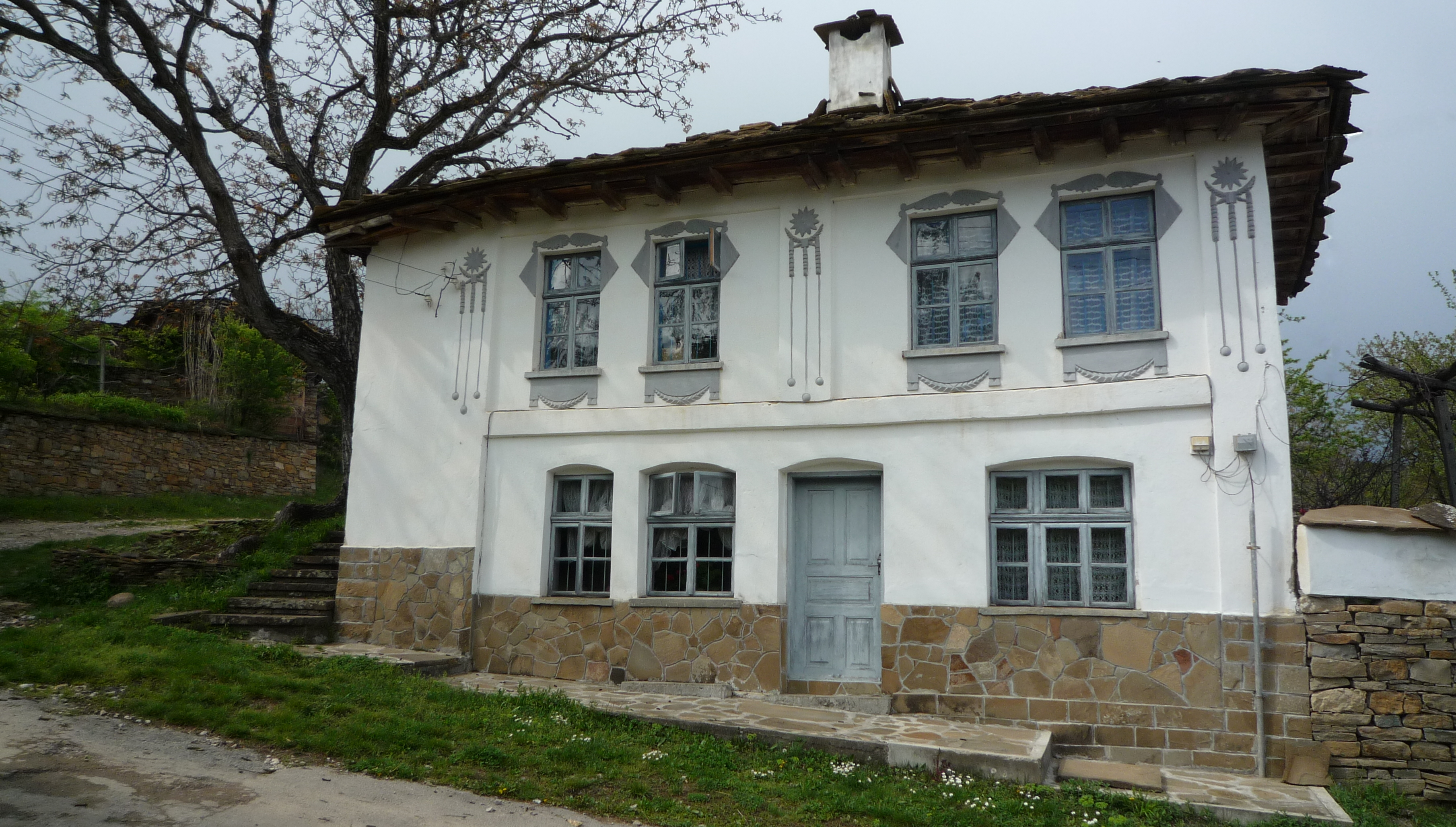 5581 Stefanovo, Bulgaria